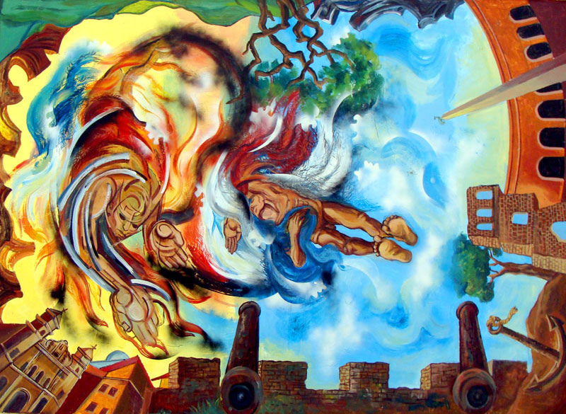 Vista del techo del lobby del edificio del INAC. Institución encargada de la difusión de las artes y cultura en la República de Panamá. Se encuentra ubicado en el antiguo Palacio de Justicia, ubicado a un costado del conjunto monumental de Las Bóvedas, en el casco antiguo de la ciudad de Panamá. El Instituto Nacional de Cultura (INAC), gestora y propulsora de las grandes obras de artes en nuestro Panamá, exhibe en sus paredes con gran orgullo la historia y transformación de Panamá en todas sus facetas. Para culminar la idea Carlos Alberto González Palomino quiso realizar un homenaje a tres poetas cuyos temas se han centrado en la preocupación por el devenir de la Patria; es el plafón central una interpretación de la última estrofa del "Canto a la Bandera", de Gaspar Octavio Hernández; a la izquierda una representación de un fragmento de "Soberanía presencia de la Patria, de Diana Morán y a la derecha una interpretación del poema Oda más que una elegía, de Ramón Oviero.